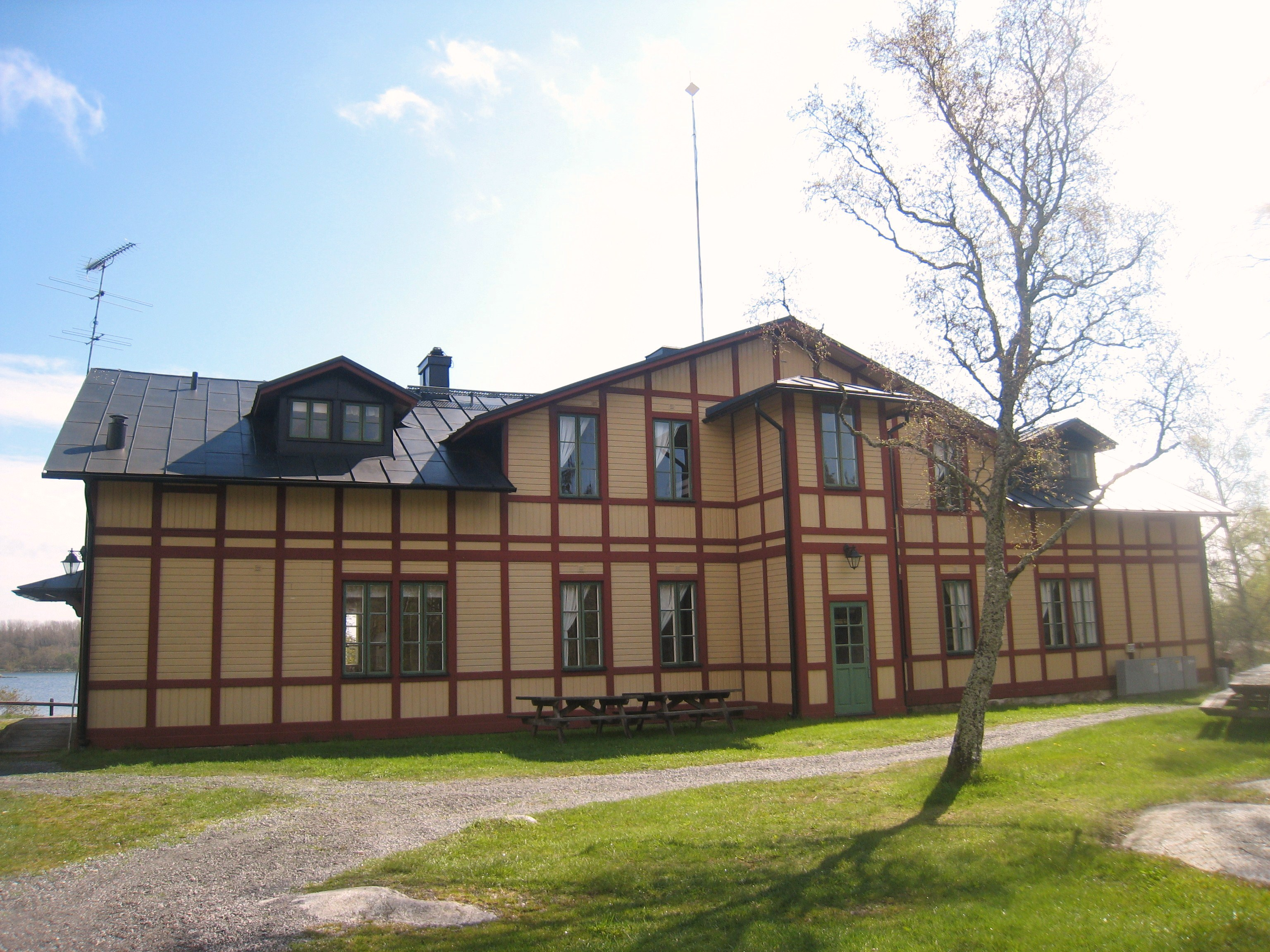 Vandrarhem på ön Fejan, Stockholms skärgård